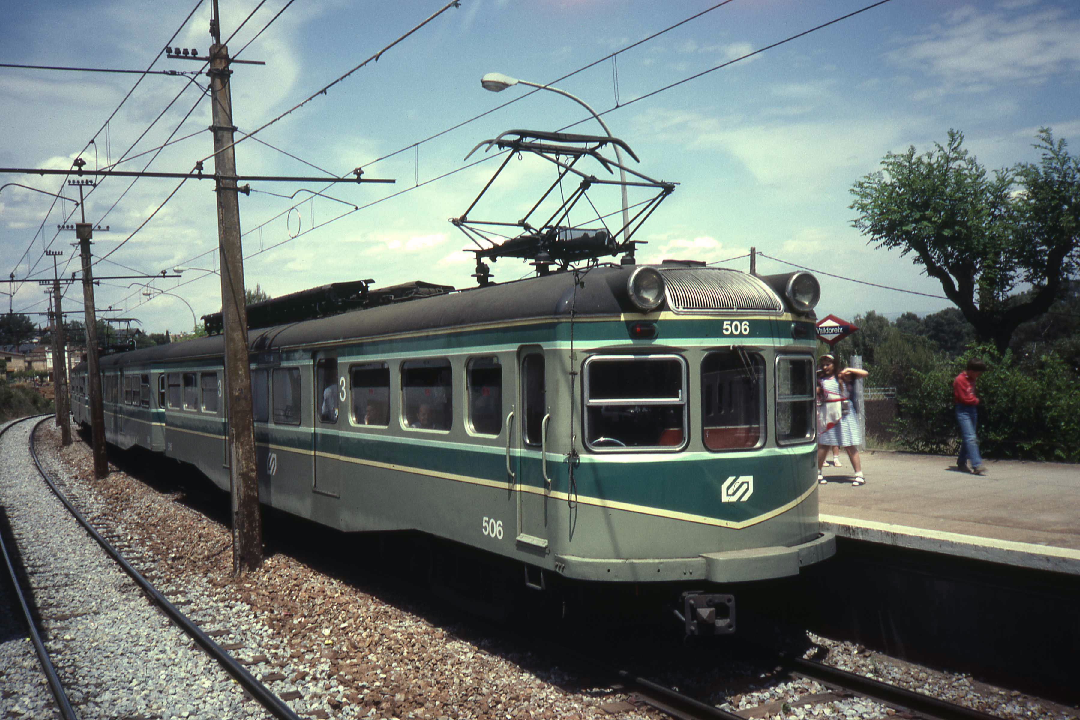 FGC trein in Valldoreix in 1987